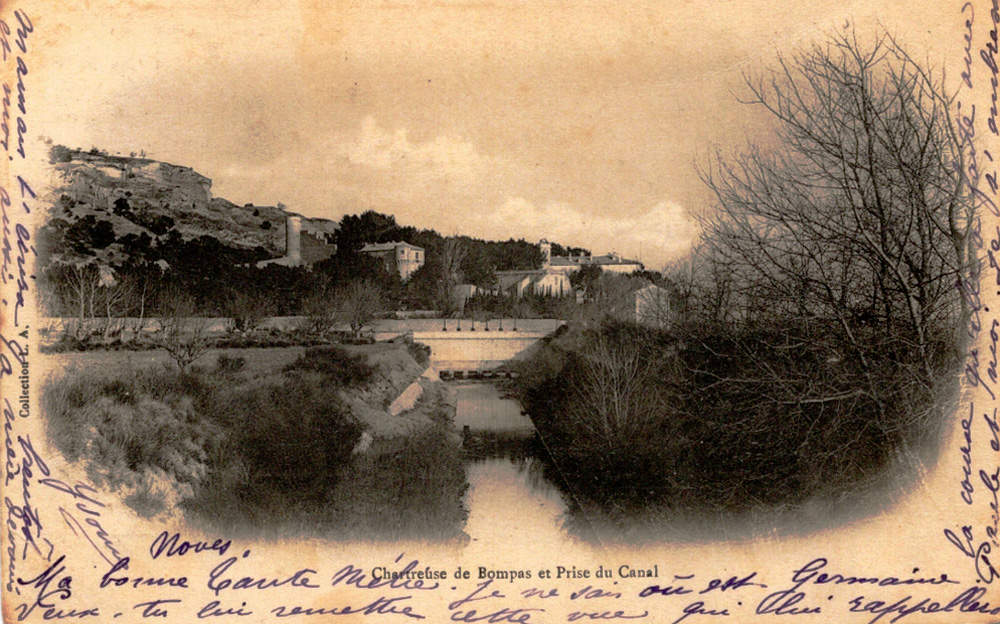 Prise d'eau du canal de la Durançole à Caumont